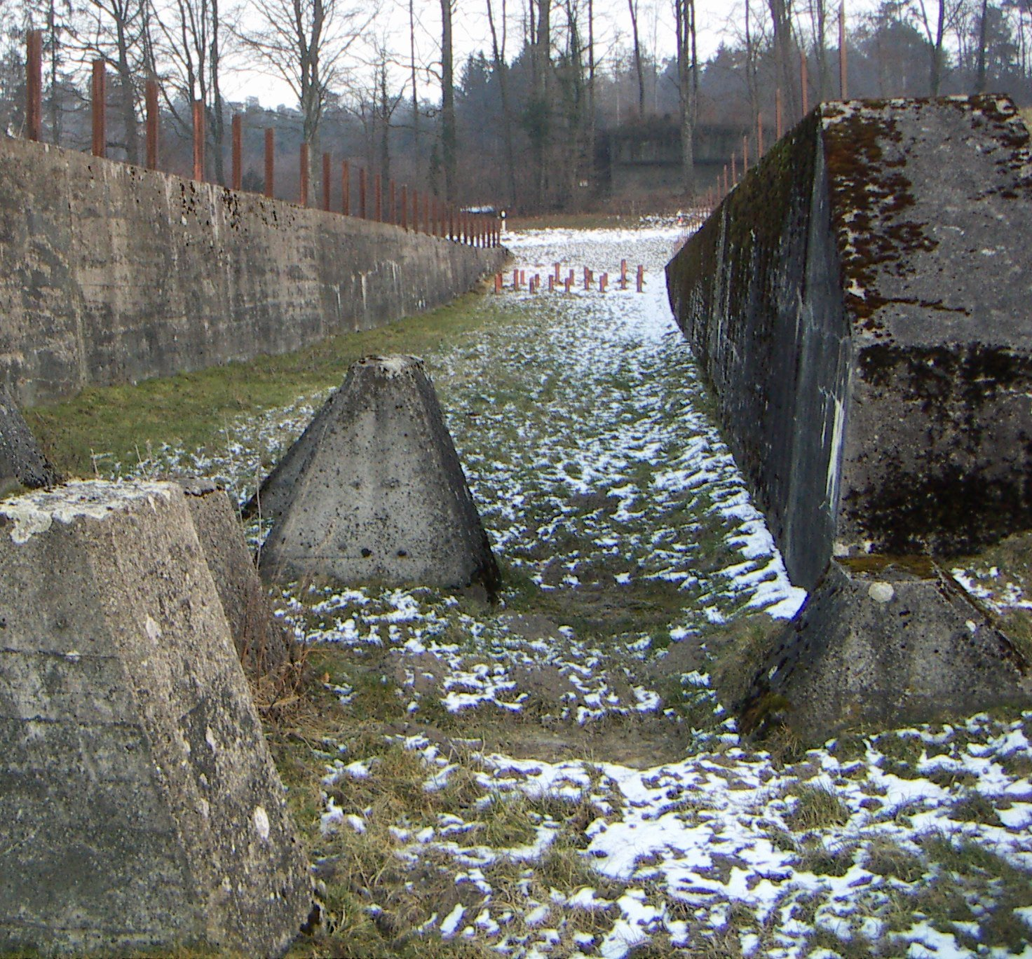 Blick von der "Toblerone" mit Panzergraben in Richtung des Panzerabwehrbunkers Standort: Gurmels, Fribourg, Schweiz: Infanteriebunker Biberenächer A 1227